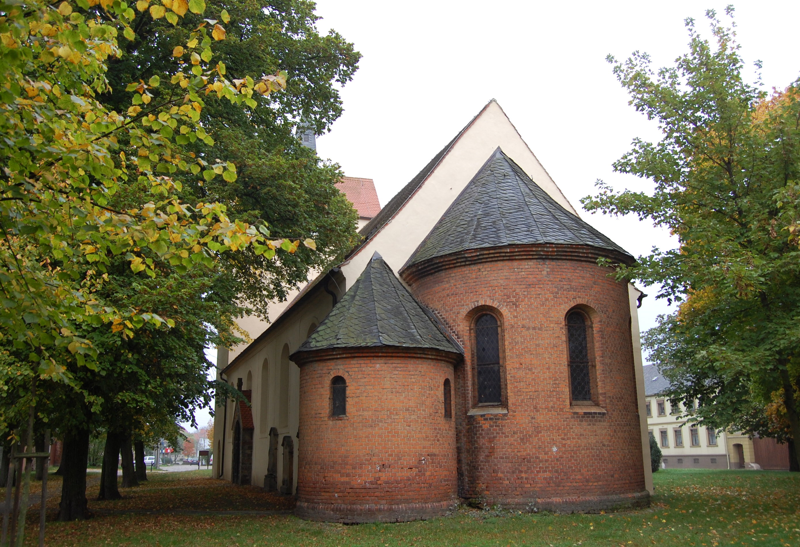 Sankt-Sebastian-Kirche Samswegen, Ostseite